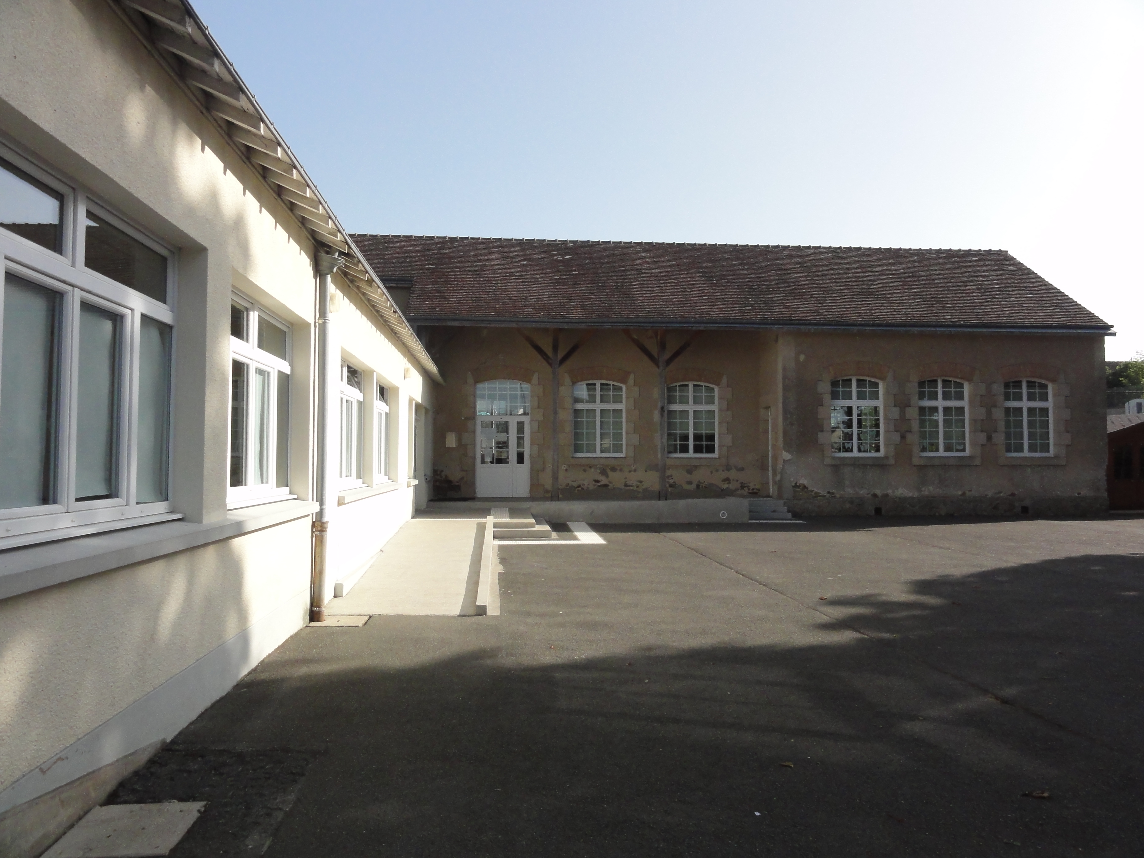 Gesnes-le-Gandelin (Sarthe) école